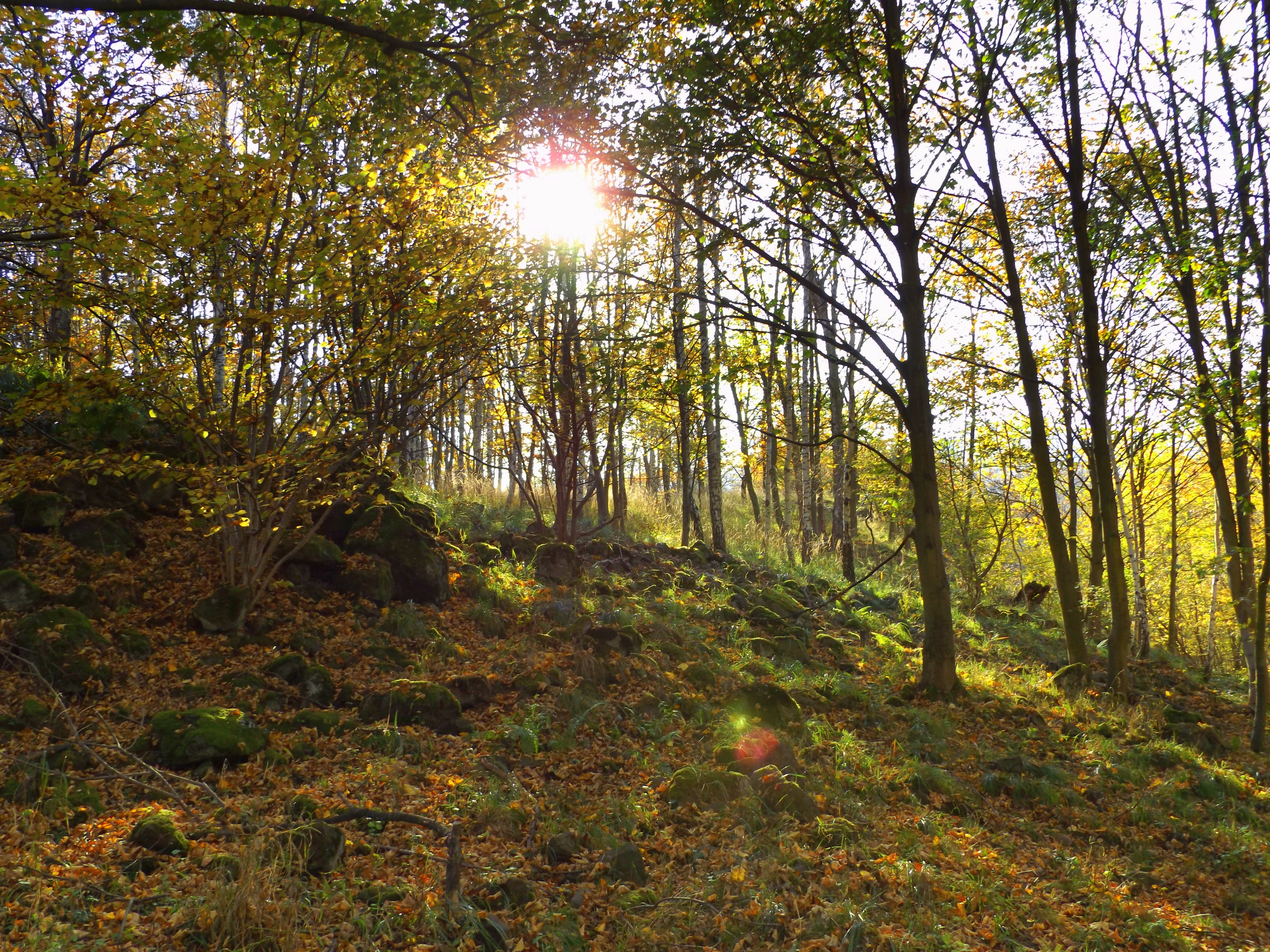 Podzimní Slunce v lesích u bývalé obce Velká Lesná